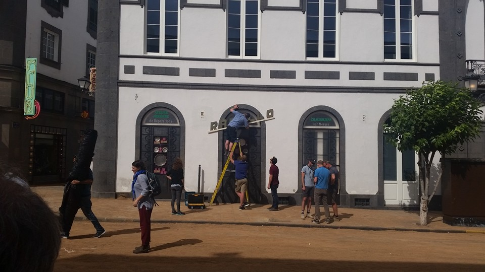 Cómo el uso de las Tic permite que personas que están en otros lugares del mundo puedan,conocer la actualidad y seguir los pasos del rodaje de una película Allied de Brad Pitt. Porque el uso de las Tic no sólo abarca el mundo de la educación literaria si no la educación artística...Y nos permite conocer también lugares de nuestra geografía que quizás desconocíamos. Por eso he enfocado mi tic en algo novedoso...No en algo que sea más de lo que tratarán mis compañeros/as las Tic desde otra visión educativa y artística. Espero que sean capaces de enfocar mi trabajo...Un cordial saludo.